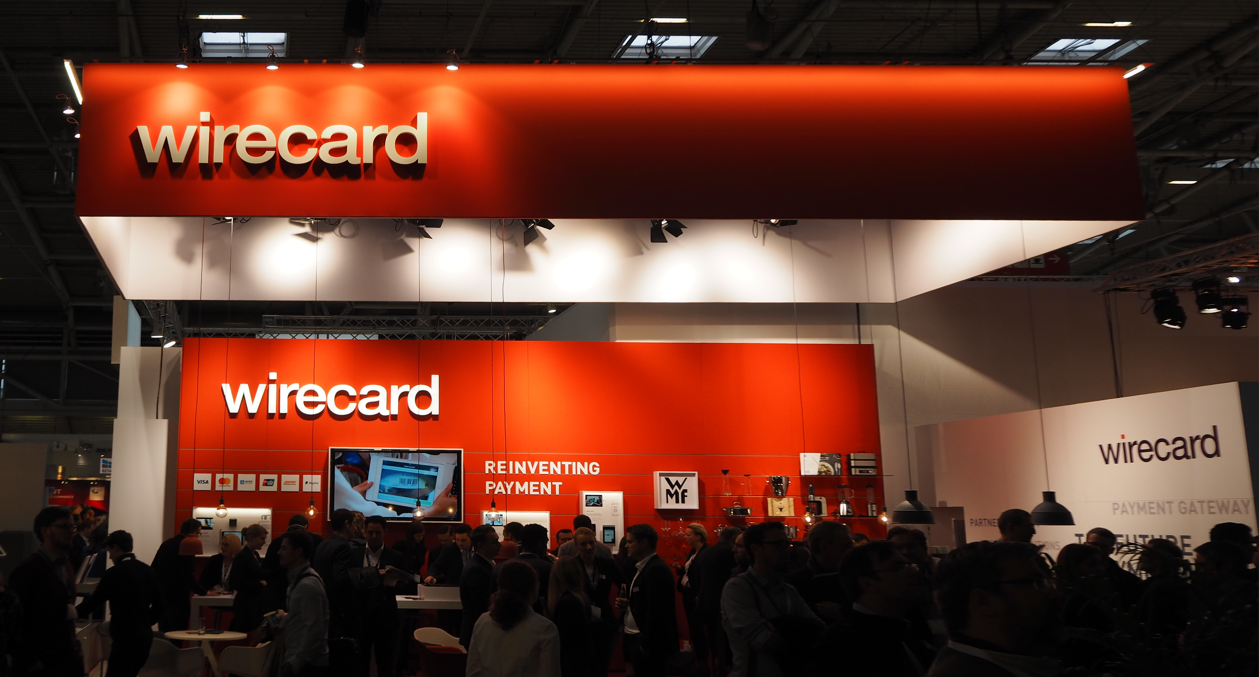 Internet World Fair 2017 in Munich, Germany, Wirecard-Stand